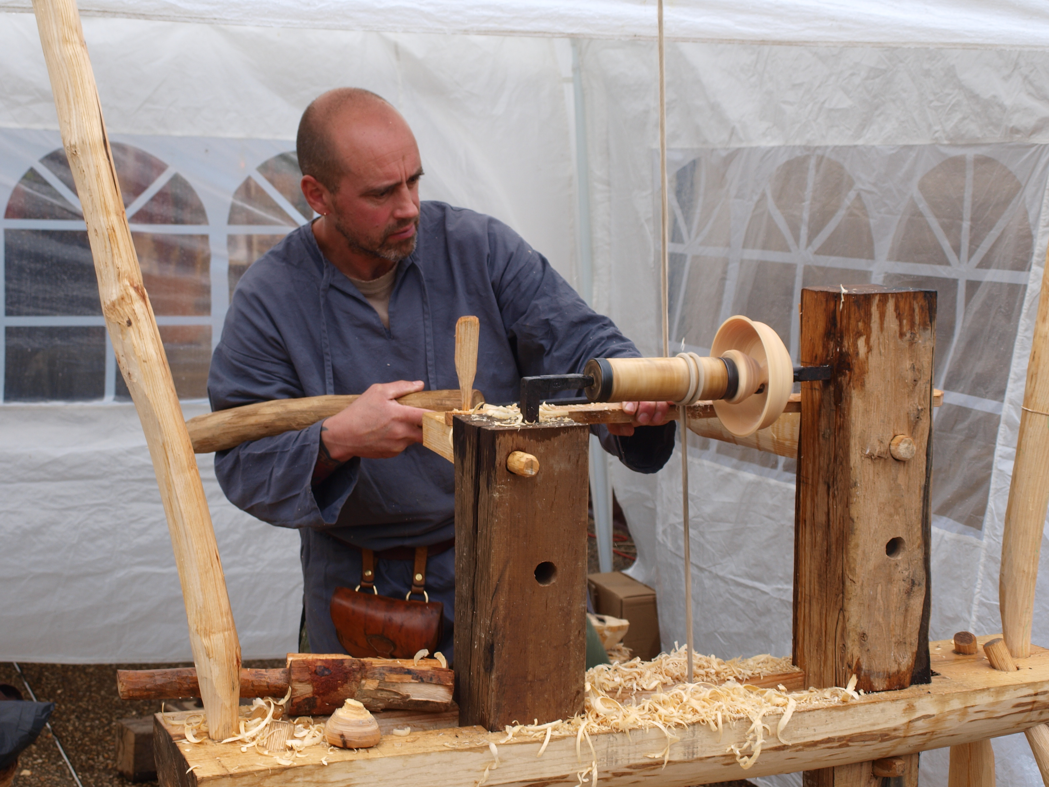 Pont-sur-Yonne; la fête médiévale 2014, organisée par la paroisse catholique romaine. Le tourneur sur bois